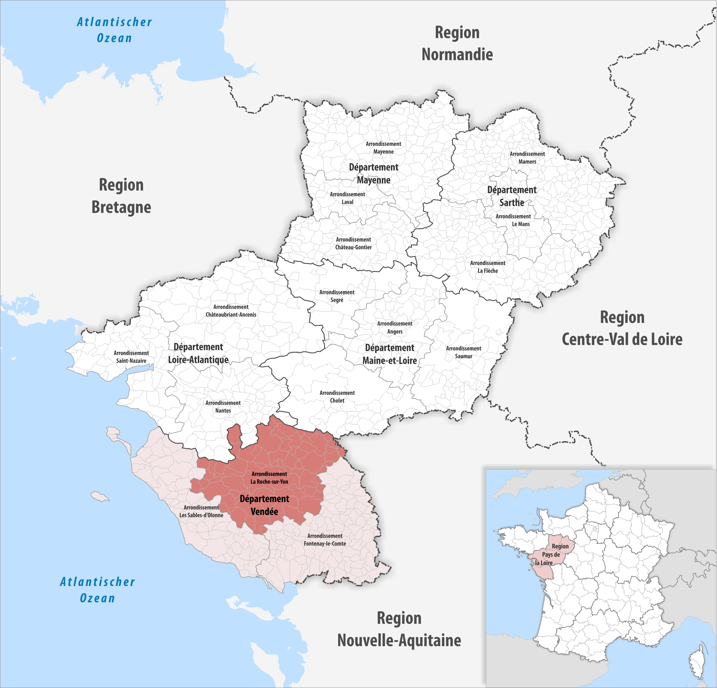 Lage des Arrondissements La Roche-sur-Yon